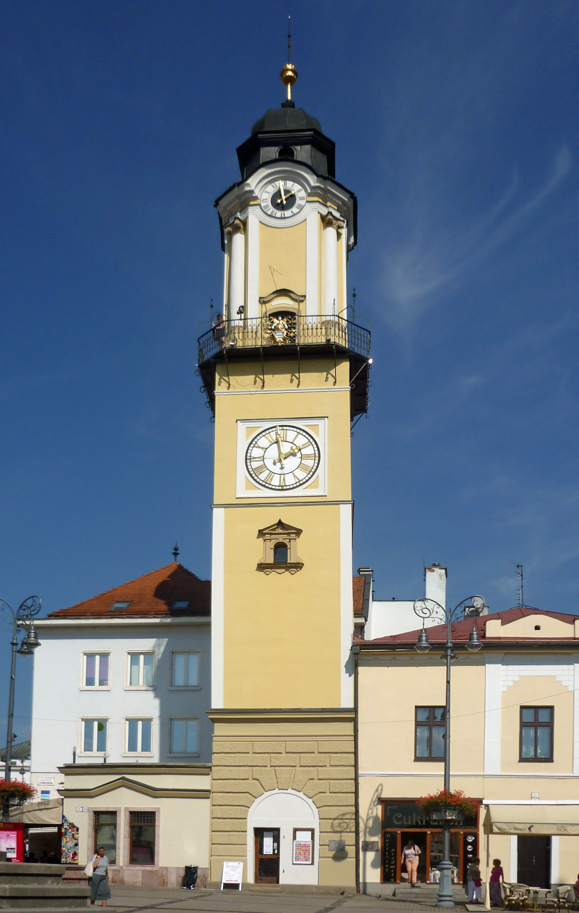 Uhrturm in Banská Bystrica (Neusohl) in der Slowakei